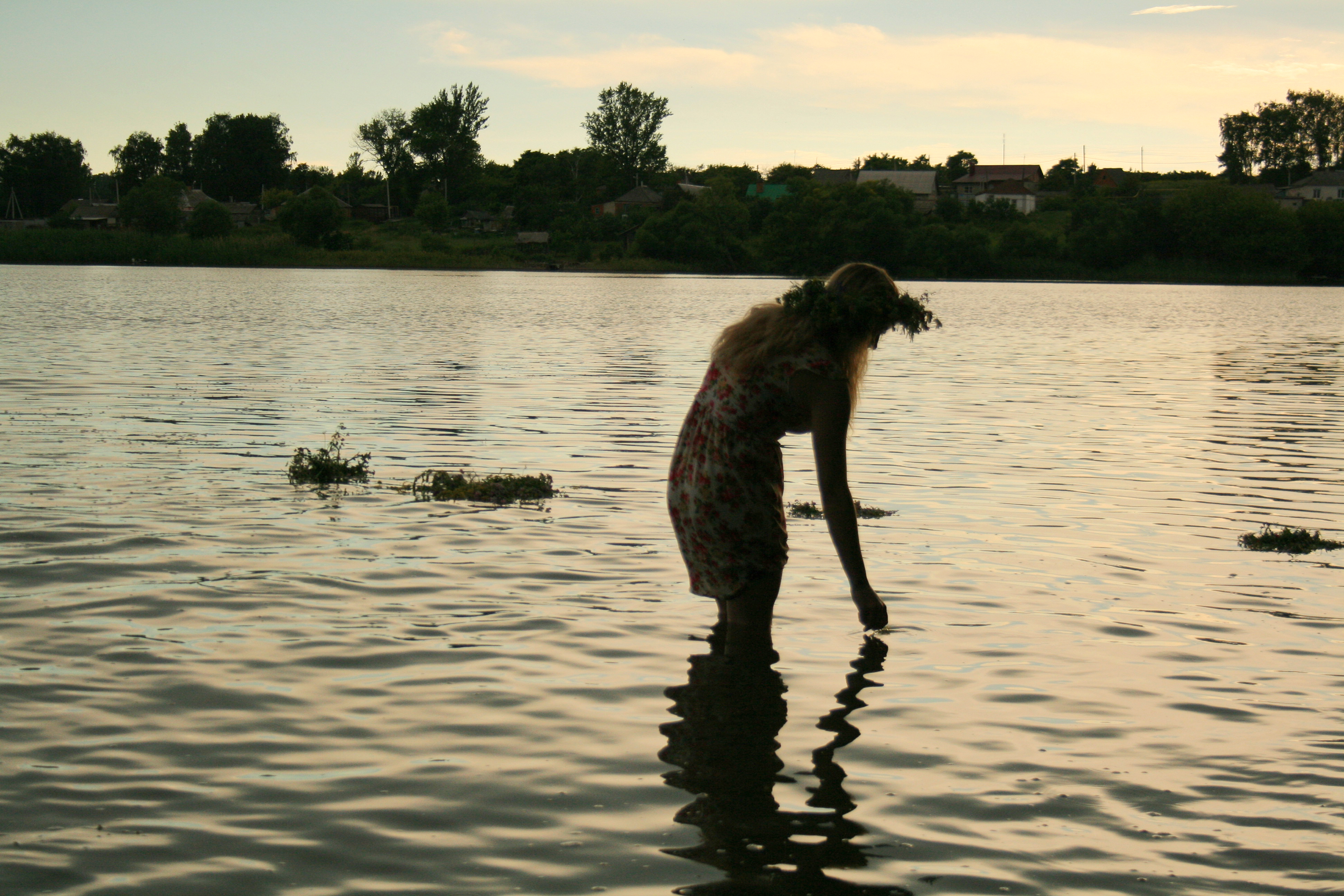 Праздник Ивана Купалы в родовом поселении «Серебряный бор», Белгородская область.